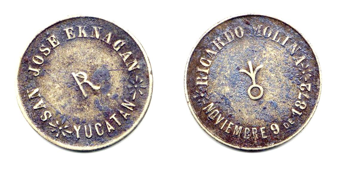 Ficha de la Hacienda San José Eknacán, Yucatán. Cospel de 20 mm de diámetro.